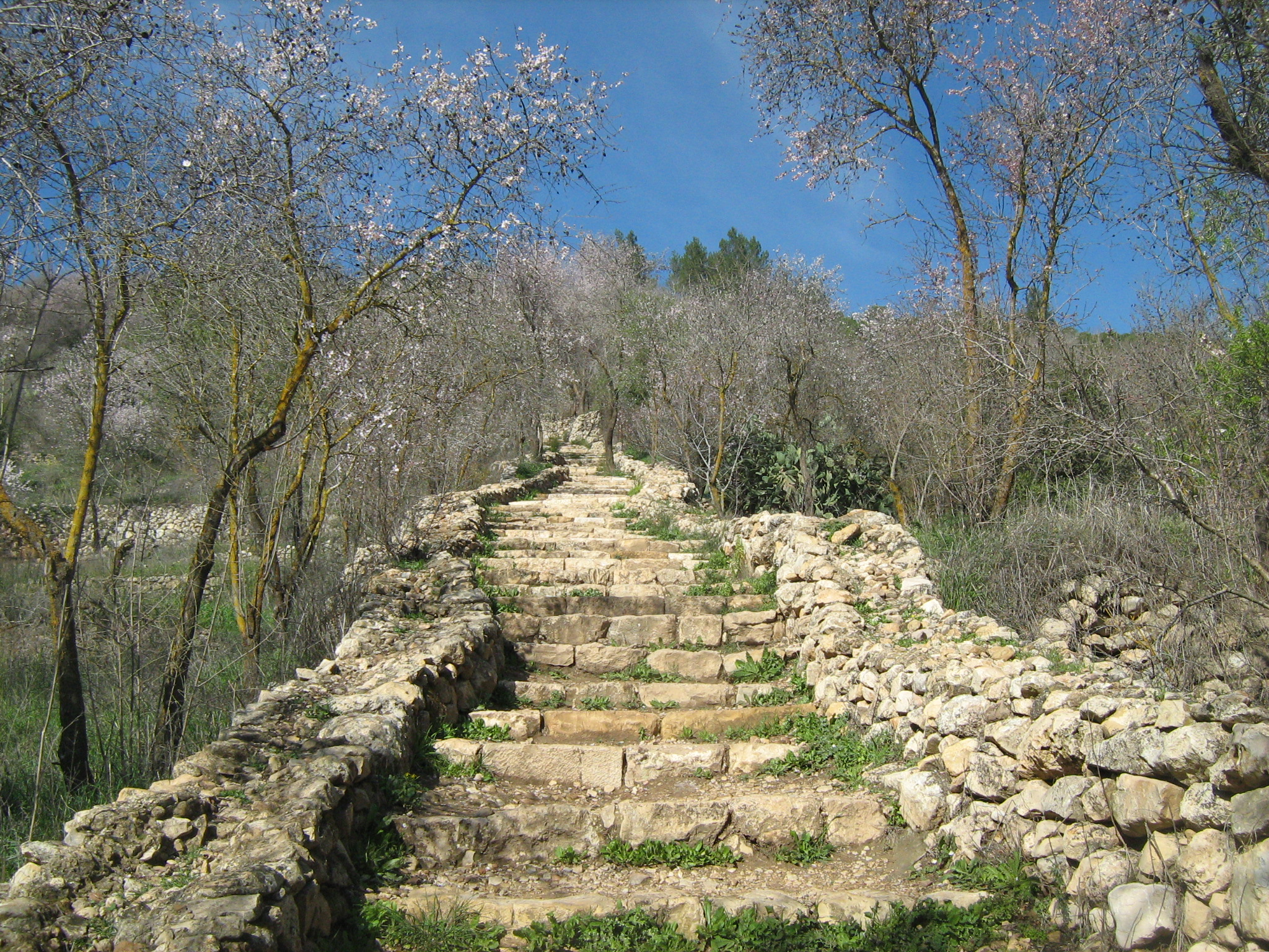 סטף